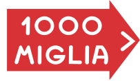 Mille Miglia sign